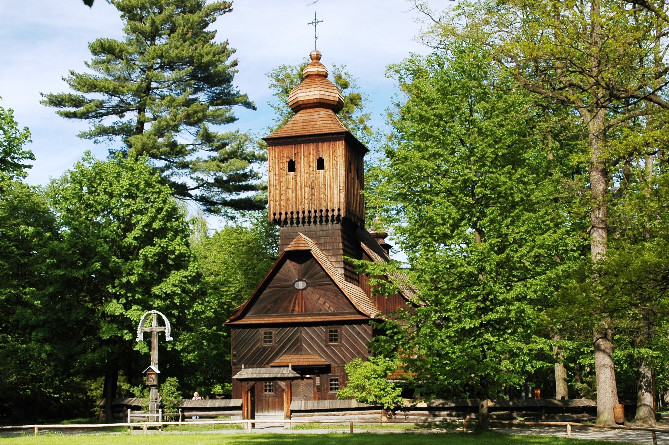 Rožnov pod Radhoštěm, Valašské muzeum v přírodě, kostel z Větřkovic u Příbora